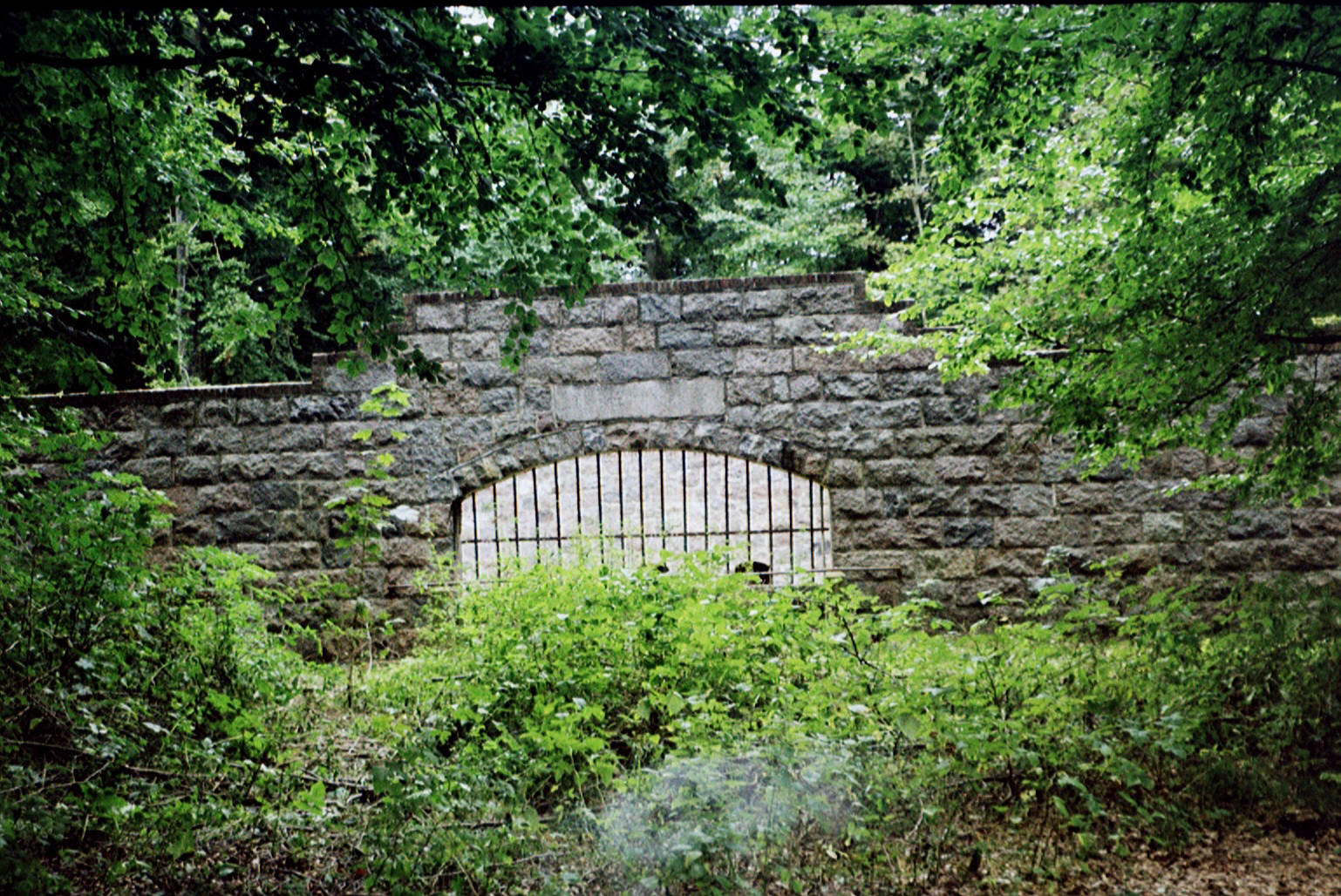 Bjørnegrotten i Rathlousdal ved Odder